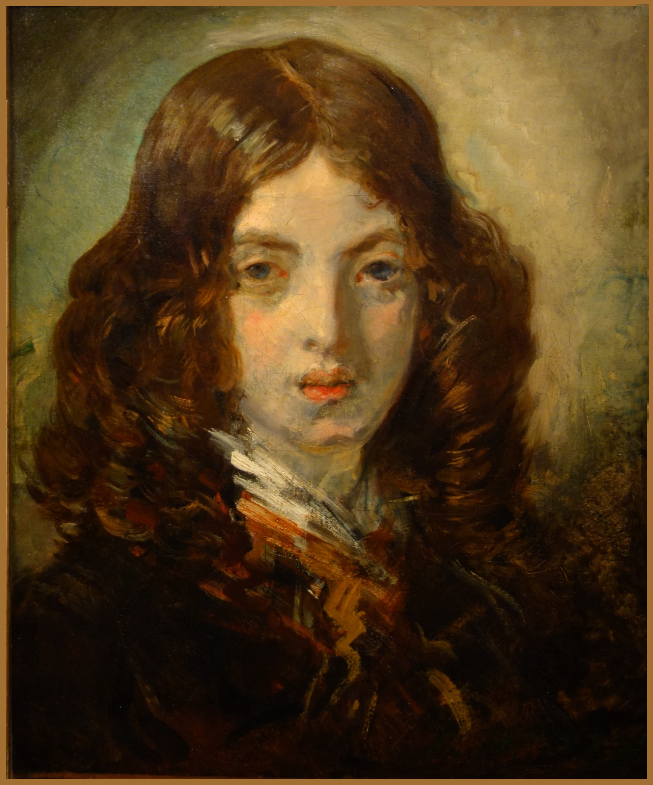 Tableau d’Émile Deroy (1820-1846) : La Mendiante rousse (vers 1843) - Huile sur toile Musée du Louvre - Paris